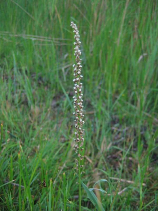 Strand-Dreizack Triglochin maritimum, Zingst